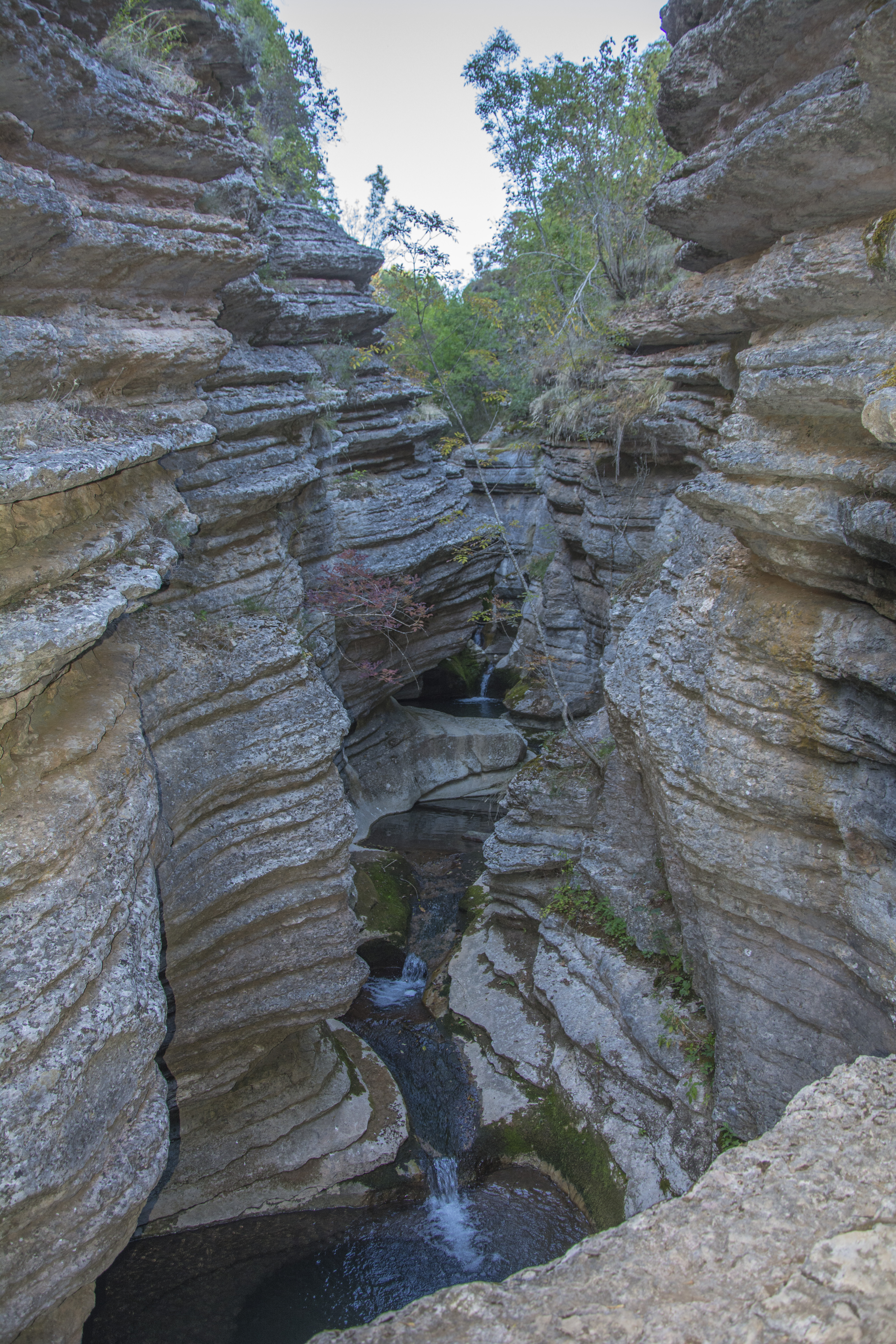 Росомачки лонци кањон 1